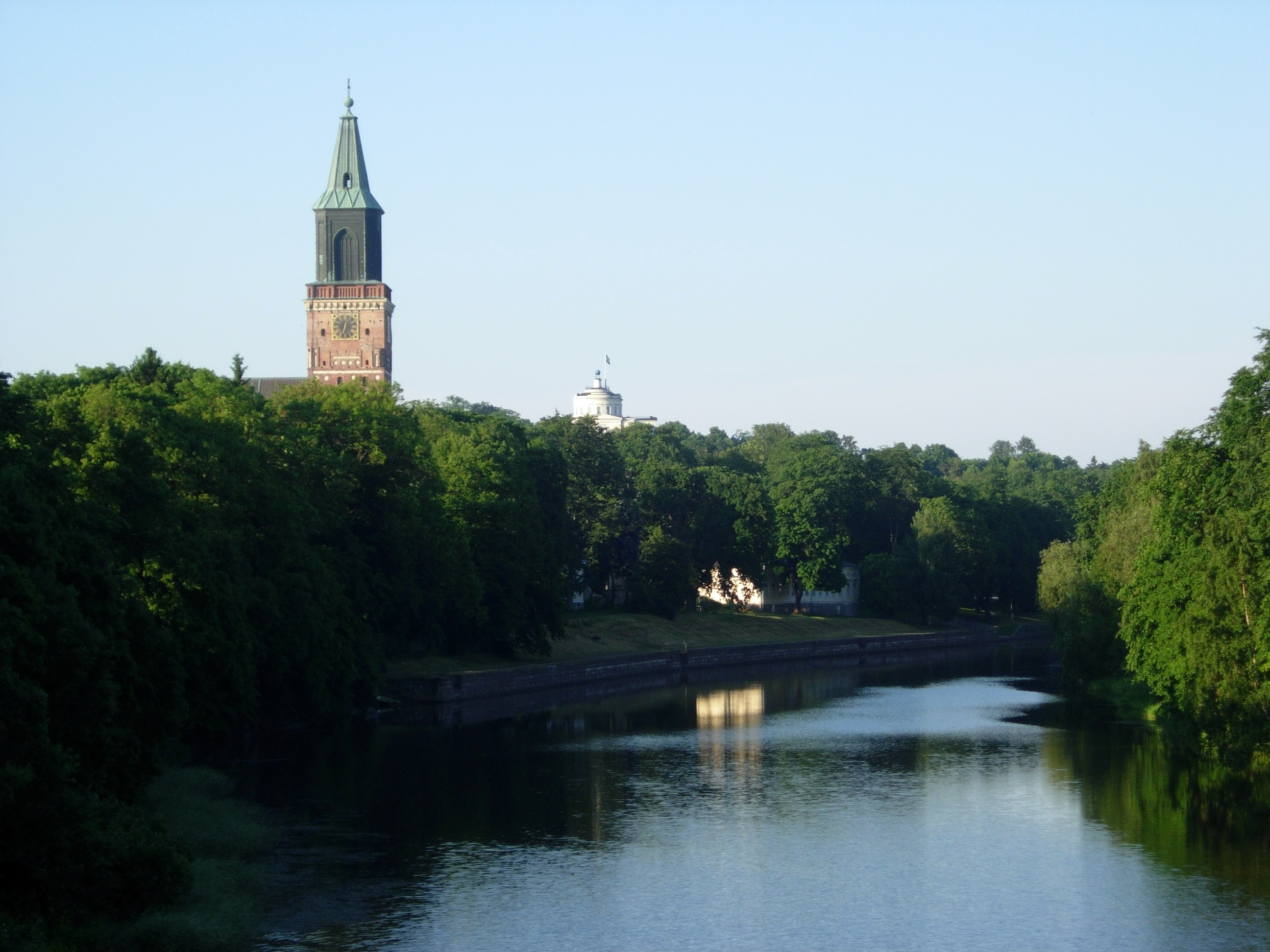 Turun tuomiokirkko on the left, Old observatory in the middle, seen from Tuomaansilta